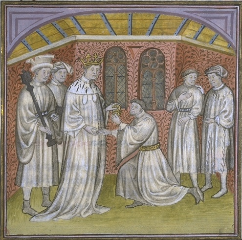 Philippe Ier , roi de France (1060-1118), achetant la vicomté de Bourges